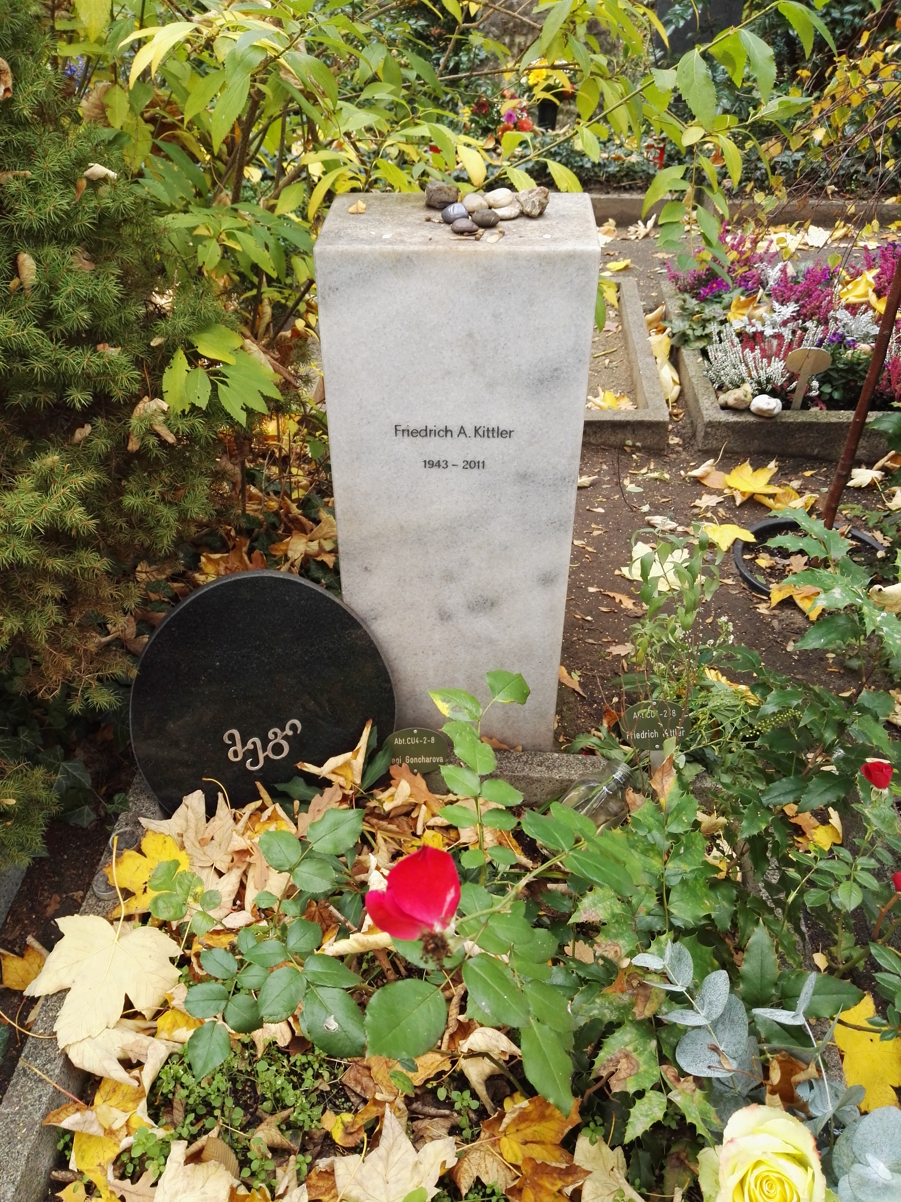 Grab von Friedrich Kittler auf dem Friedhof der Dorotheenstädtischen und Friedrichswerderschen Gemeinden in Berlin-Mitte